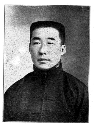 中華民國國會議員